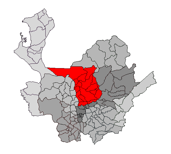 Ubicación de la región Norte en el departamento de Antioquia